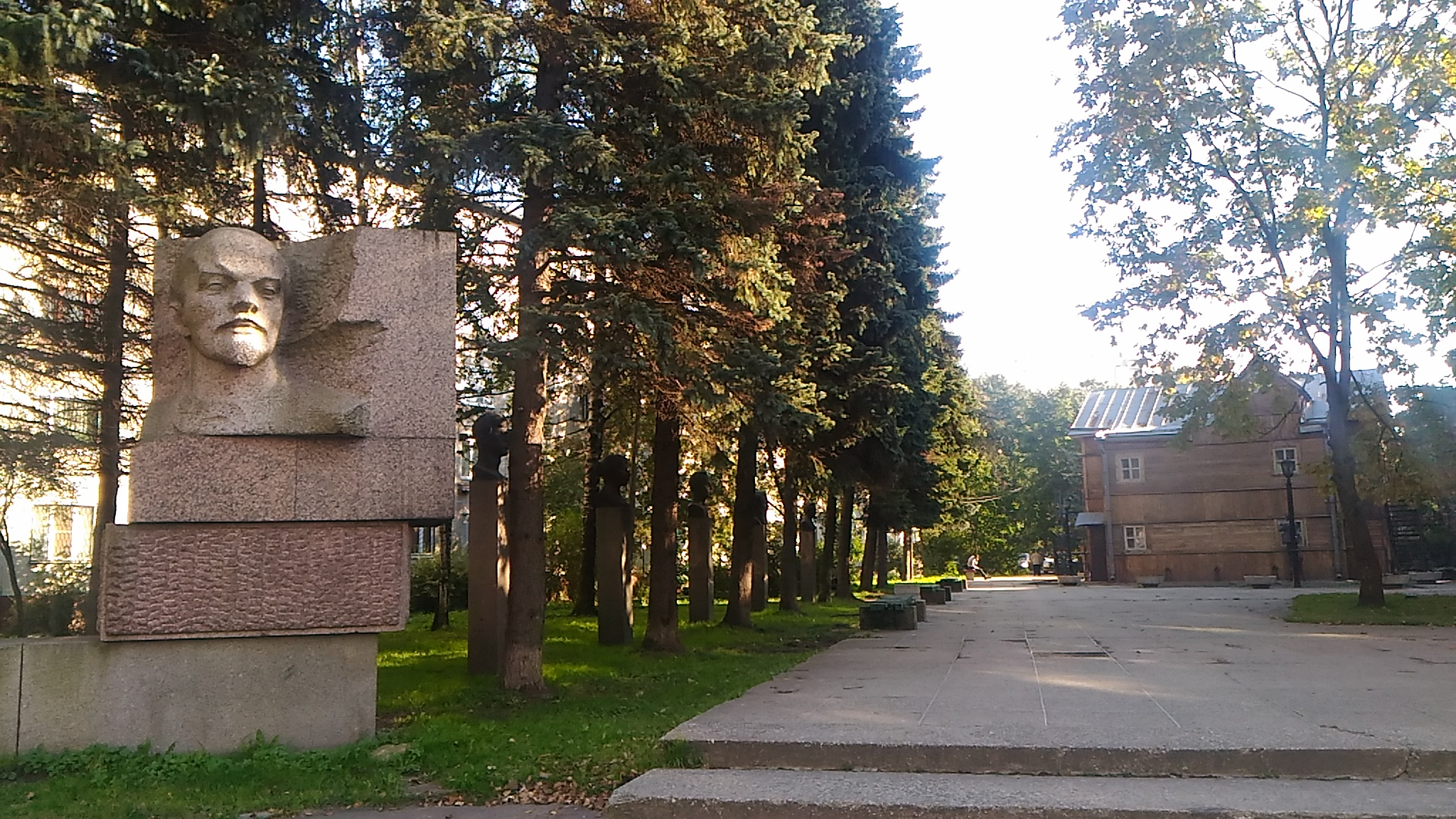 Дом, где в 1894-1917 гг. проводились собрания рабочих-марксистов: Ново-Александровская улица, 23, Невский район, Санкт-Петербург. Памятник В.И. Ленину. Архитекторы А. Д. Левенков и П. И. Мельников, скульптор В. И. Трояновский (1974).